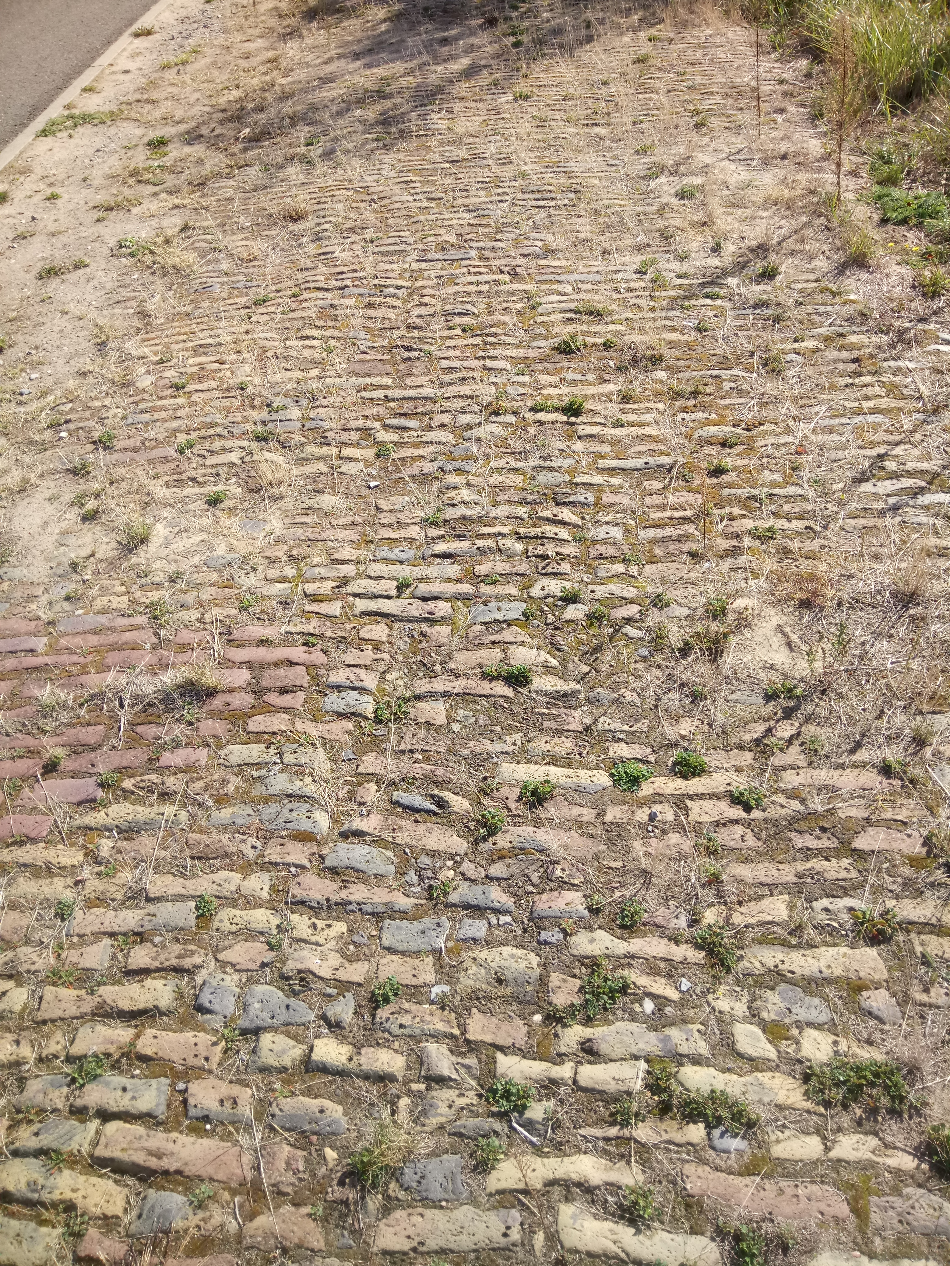 Die Steege ist eine historische Ziegelpflasterstraße die seit 2004 unter Denkmalschutz steht. Sie führt von der Ortslage Schmergow zum Trebelsee. Schmergow ist ein Ort unmittelbar südlich der Havel gelegen zwischen Brandenburg an der Havel und Werder (Havel) in der Mittelmark im Westen des Landes Brandenburg. Er gehört zur Gemeinde Groß Kreutz (Havel). Schmergow ist geprägt durch landwirtschaftliche Nutzungen wie Obst-, Gemüse- und Getreideanbau, ehemalige Lehmabbaugebiete und Auenwälder am Ufer der Havel.